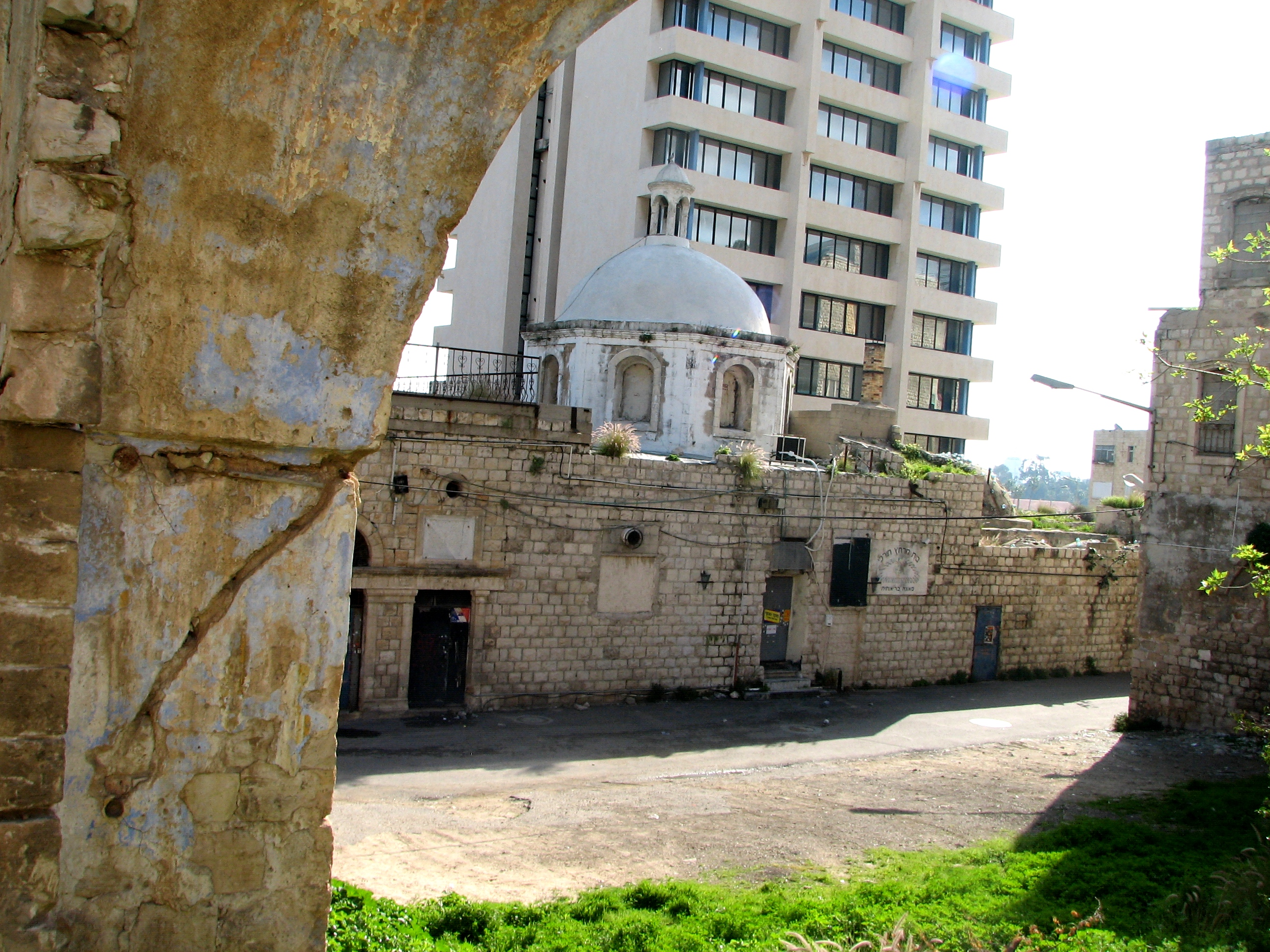 Al Pasha Complex. House & Turkish bath in Downtown Haifa, Israel מתחם אל-פאשה, כולל מבנה של בית מרחץ טורקי מהמאה התשעה עשרה ובית משפחת אל-ח'ליל ששניים מבניה היו ראשי עיריית חיפה . החמאם שנבנה במאה ה-19 על ידי מוסטפא פאשה אל-חליל. ורחוב חמאם אל פאשה. מבט מרחוב שיבת ציון